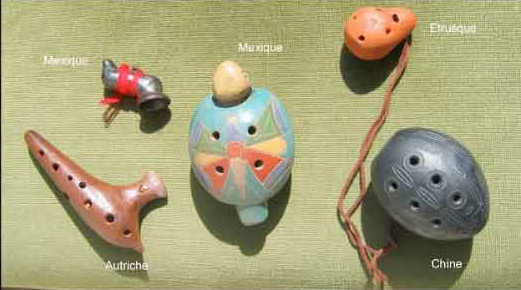 las ocarinas de la coleccion de abaji, el poeta de los beduinos....